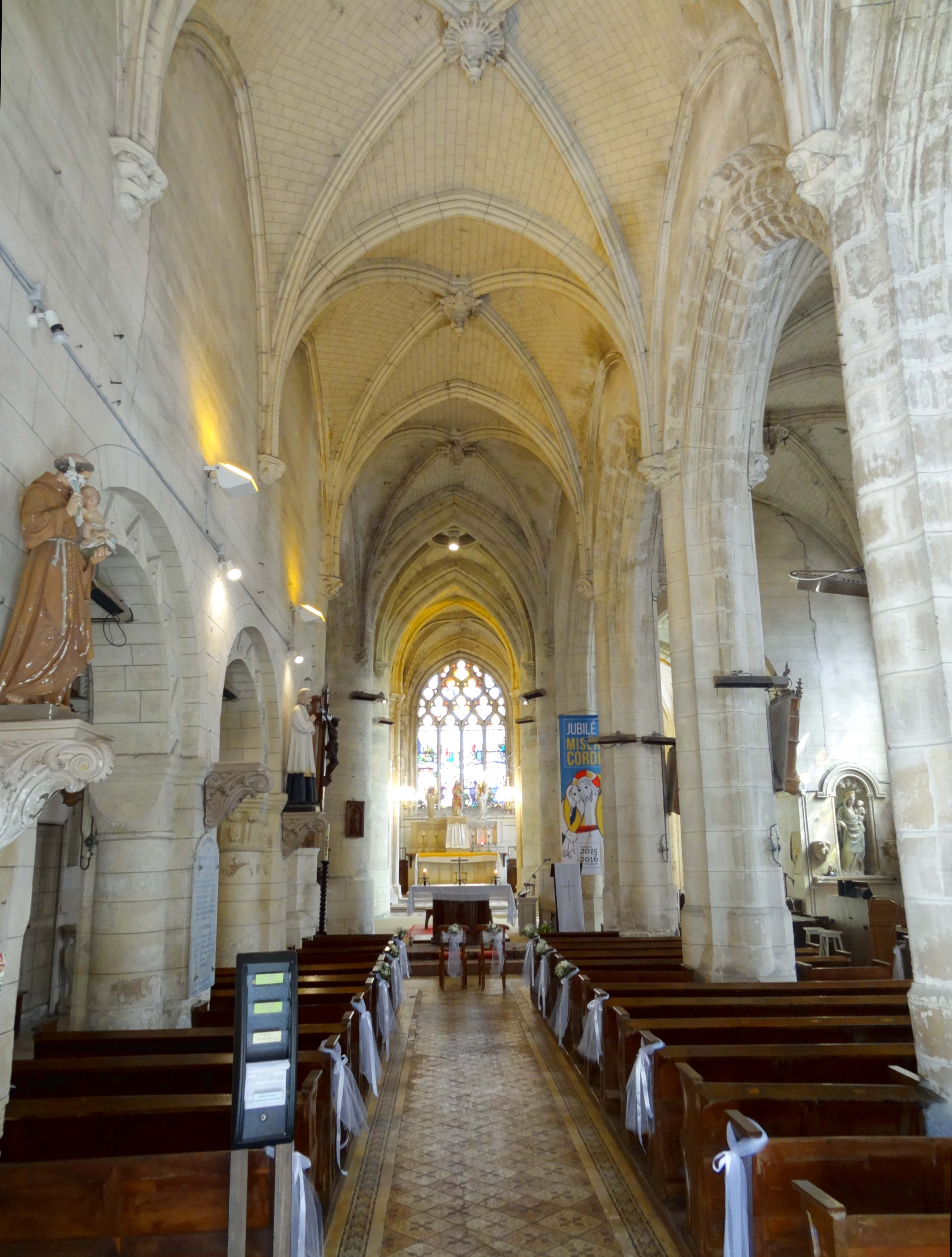 Intérieur de l'église - voir titre.